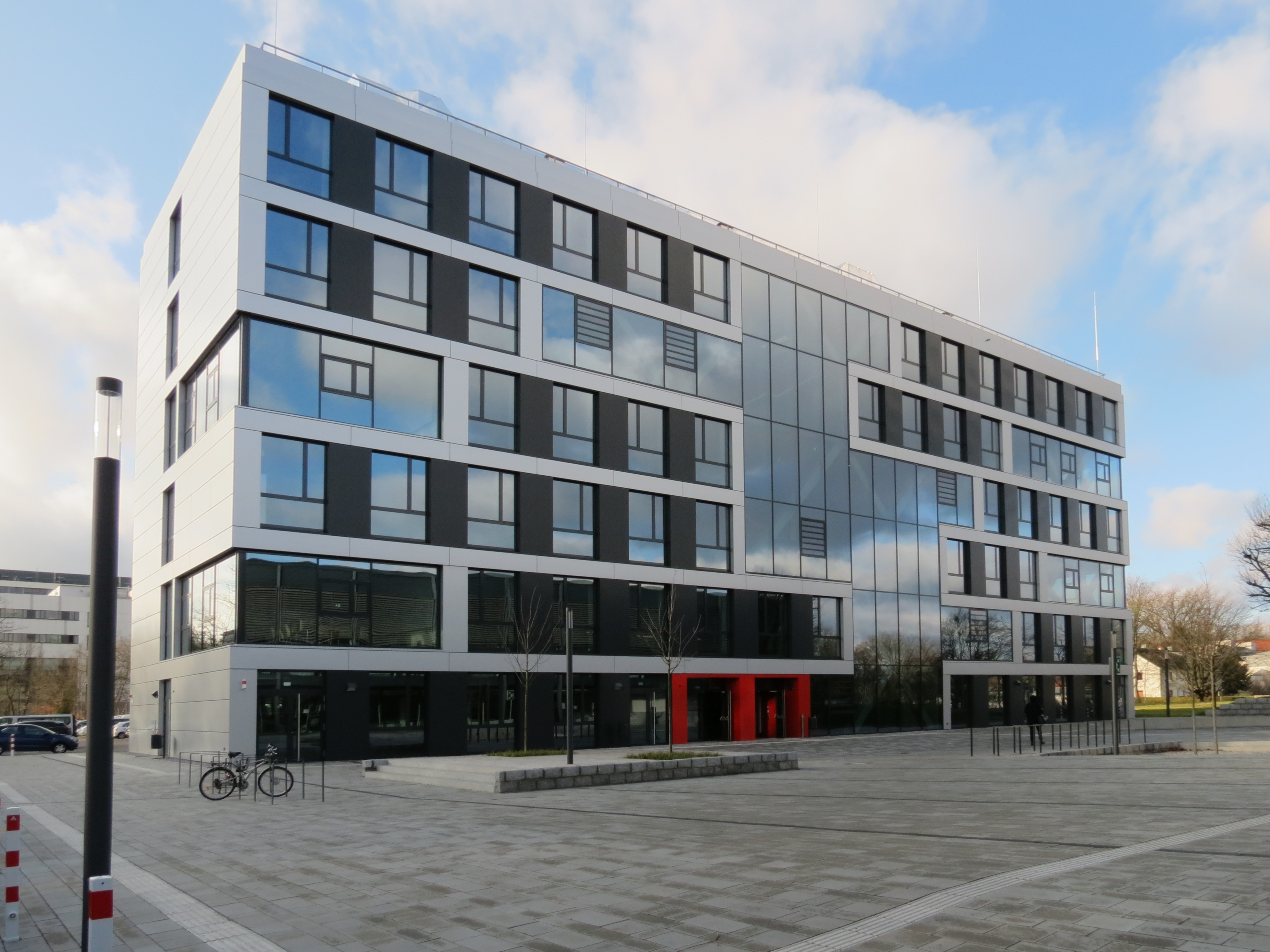 Das 2019 neu errichtete Seminargebäude ist das Hauptgebäude der Fachbereiche Architektur, Bauingenieurwesen und Umweltingenieurwesen.